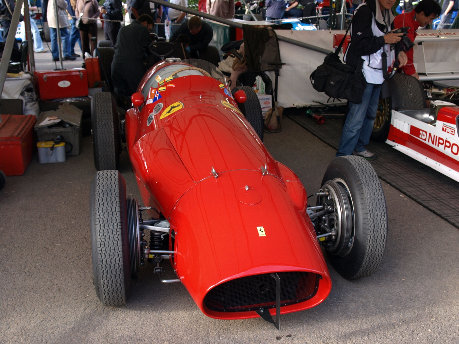 Ferrari